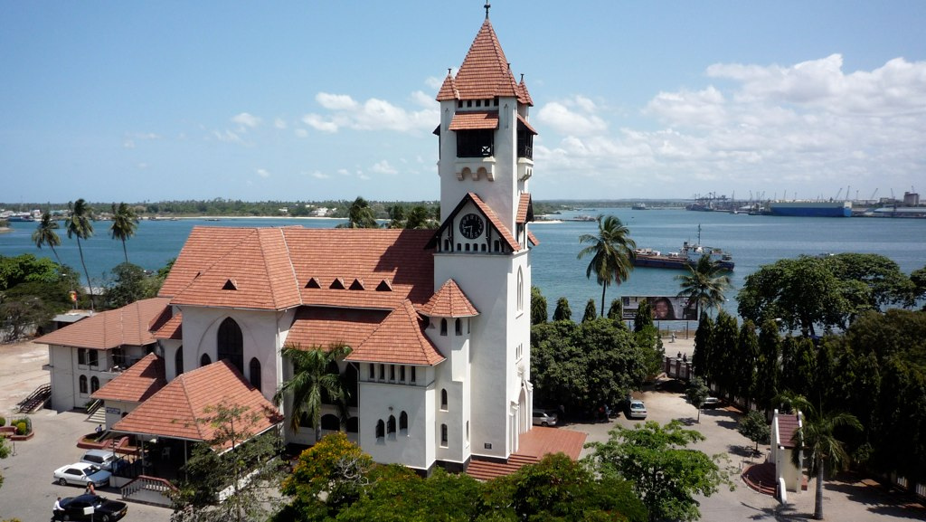 Church Dar Es Salaam